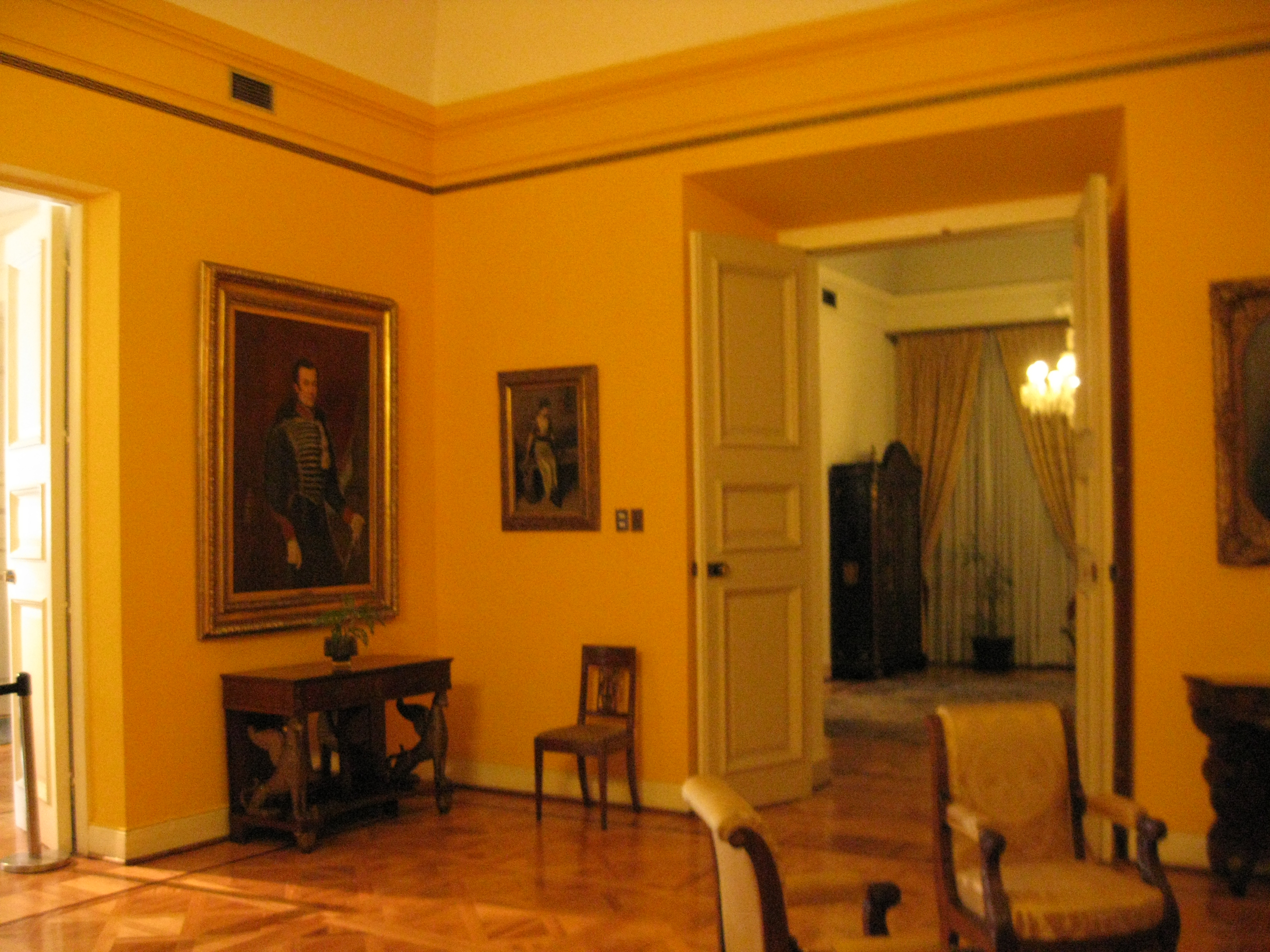 Salón Amarillo Palacio de La Moneda, Santiago de Chile.